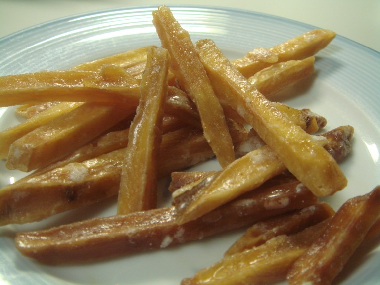 芋けんぴ